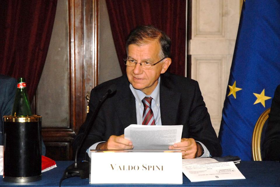 On. Valdo Spini durante una conferenza AICI